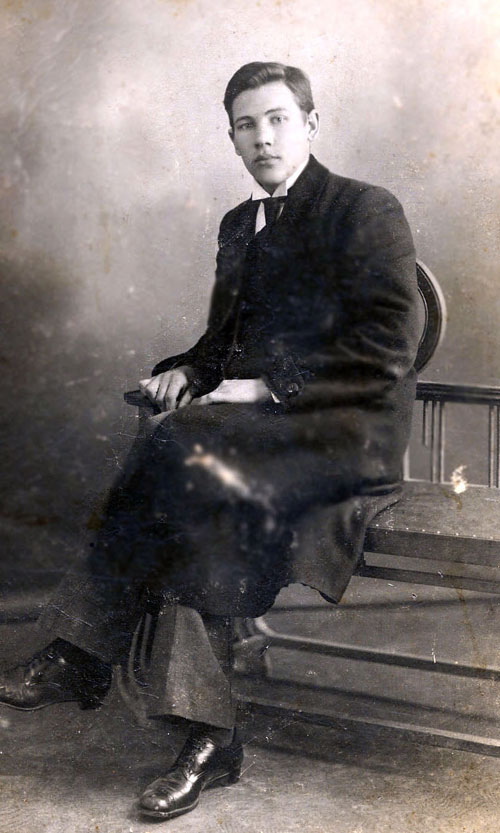 отец, дата неизвестна